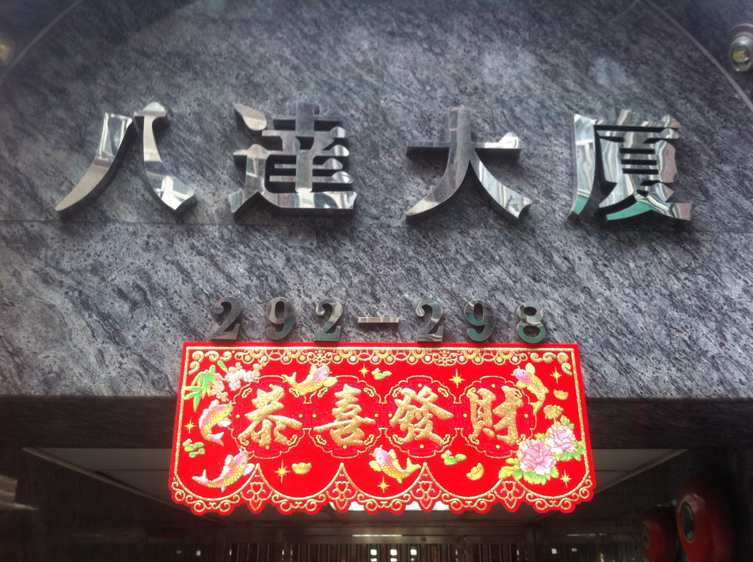 中文（香港）: 香港島西環 皇后大道西 292-298 八達大廈